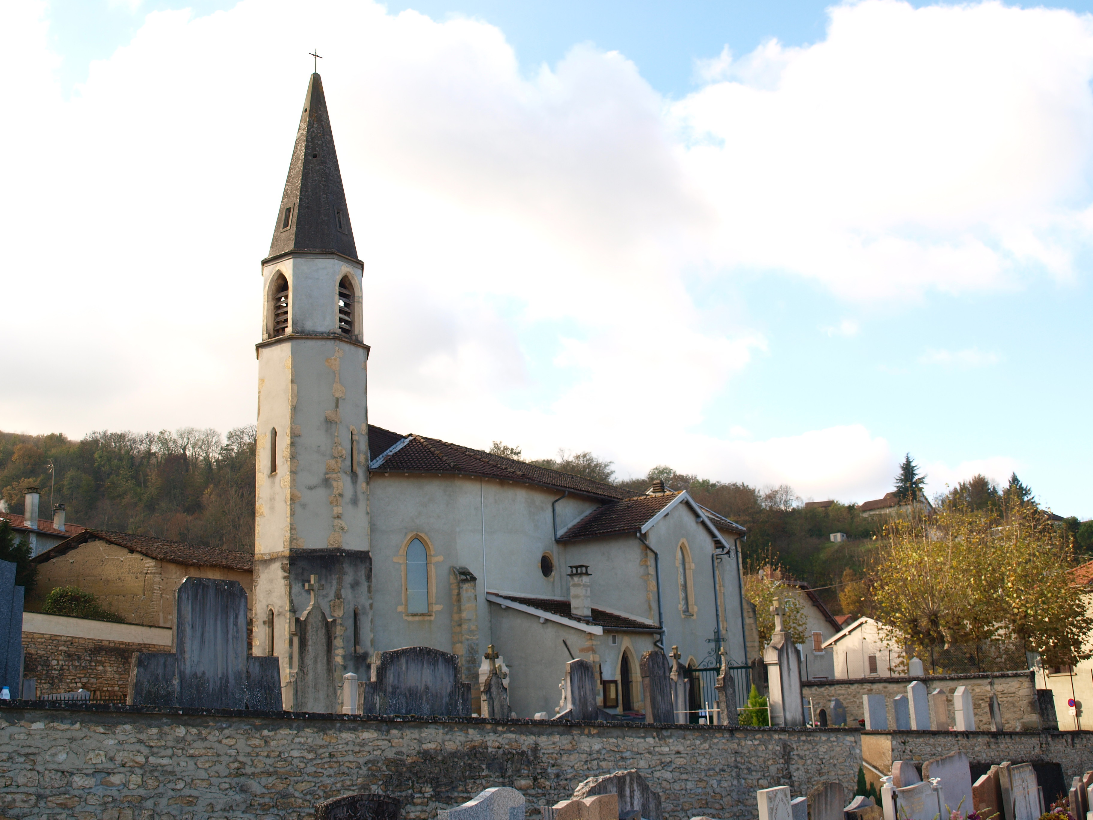 Domarin (Isère, France) ; église